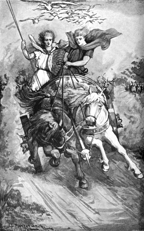 Cuculain and Laeg Returning from their First Foray